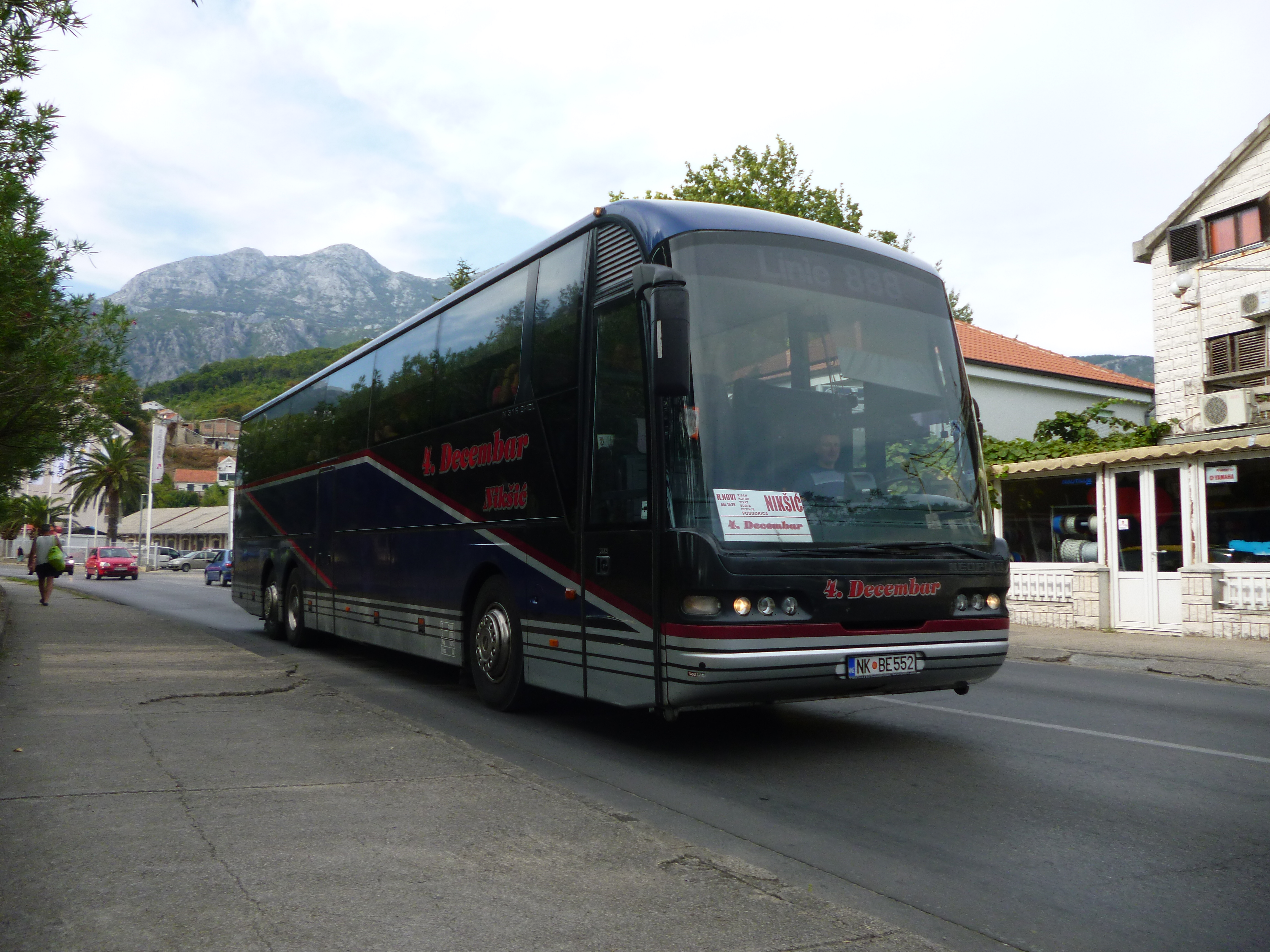 Srpski (latinica): 4. Decembar Nikšić